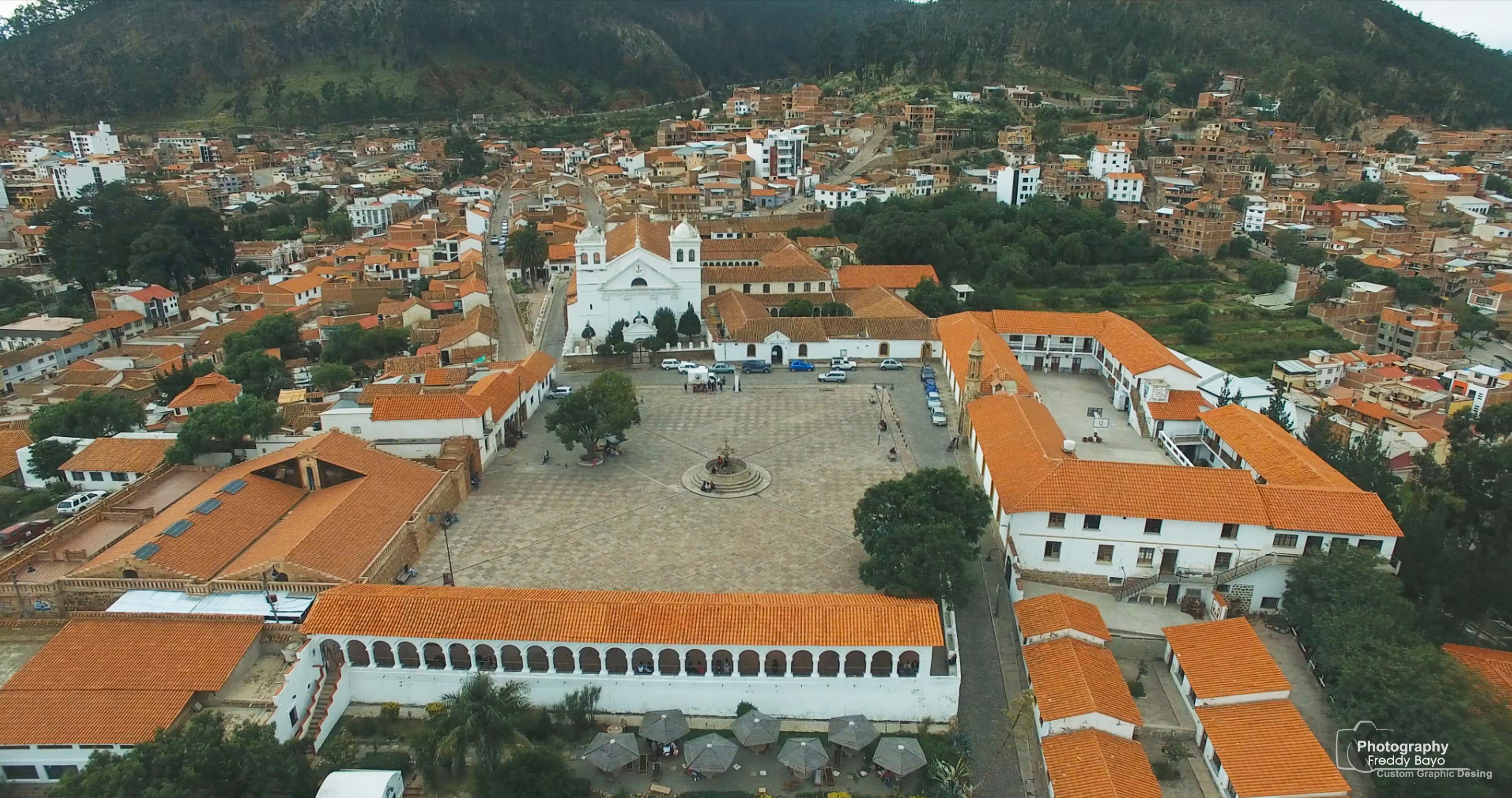 vista aerea